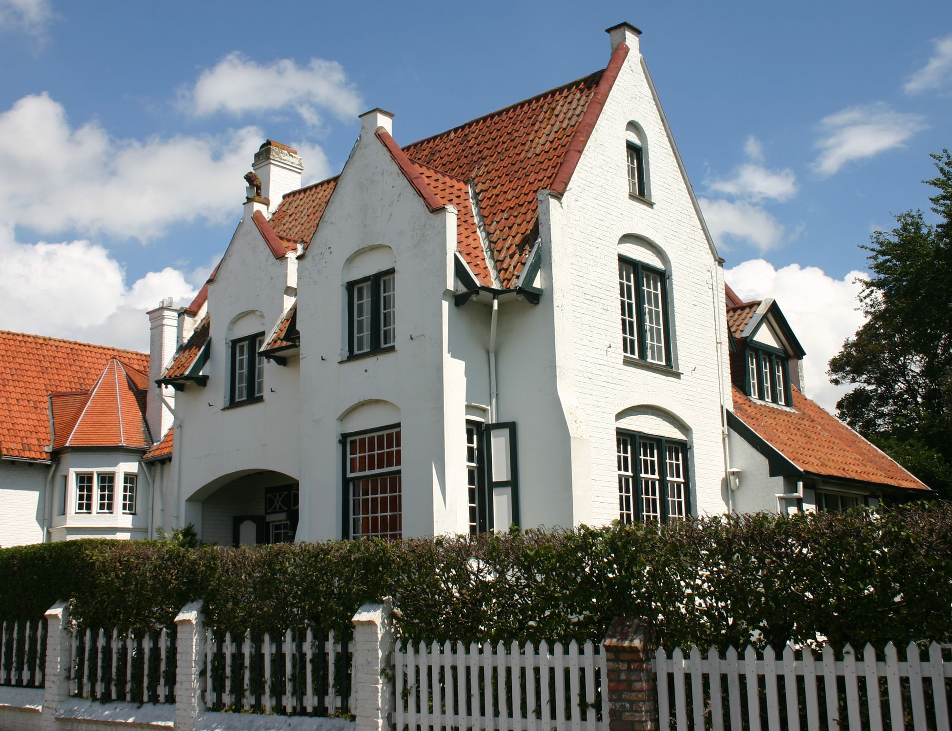 Villa Ter Wilgen à Duinbergen. Résidence d'été du peintre belge Emmanuel Viérin. Les plans de cette villa ont été dessinés en 1910 par le frère du peintre, Joseph Viérin.